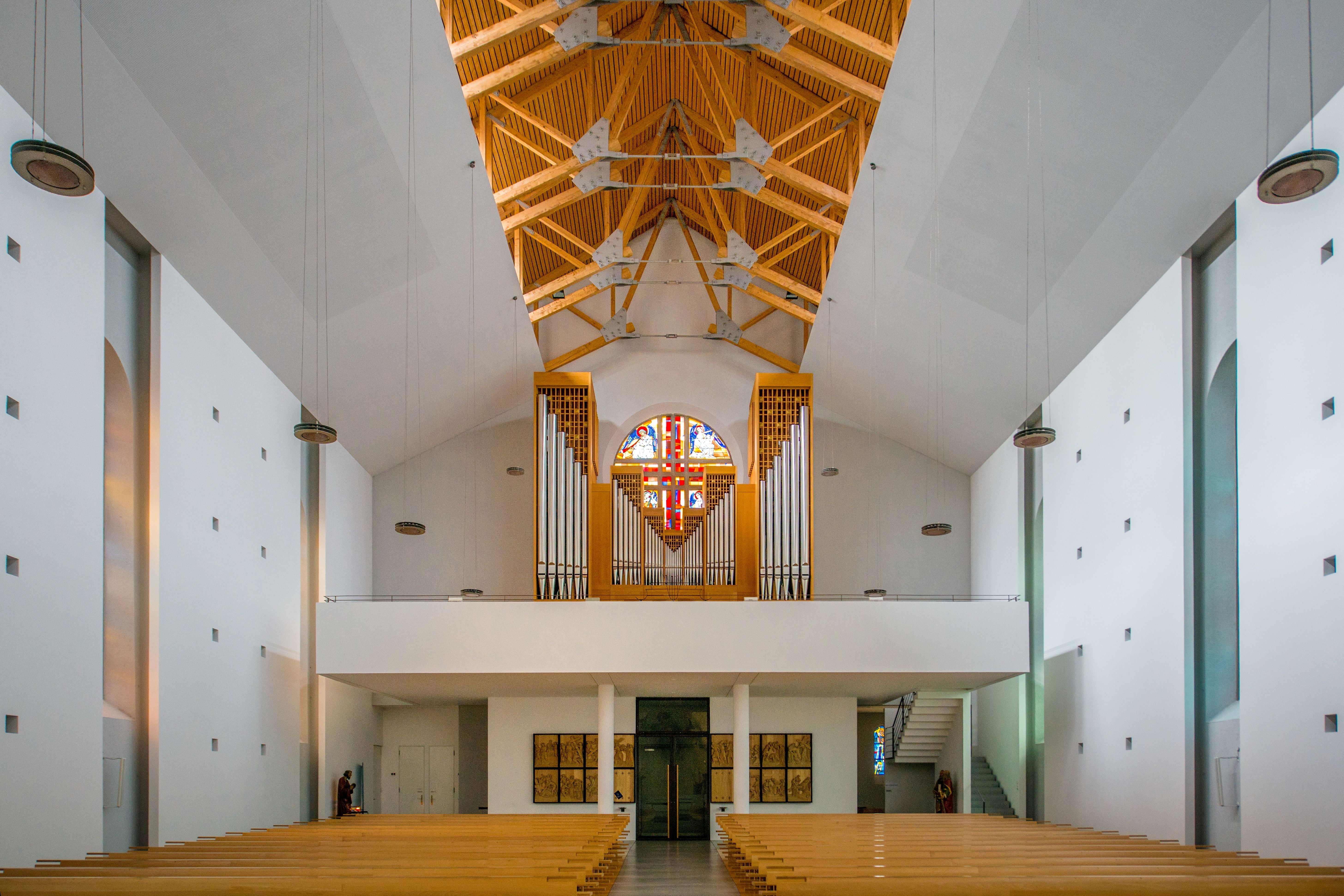 Pfarrkirche Hll. Peter und Paul, erbaut 1830 nach Plänen von Alois Negrelli in Lustenau, Vorarlberg.